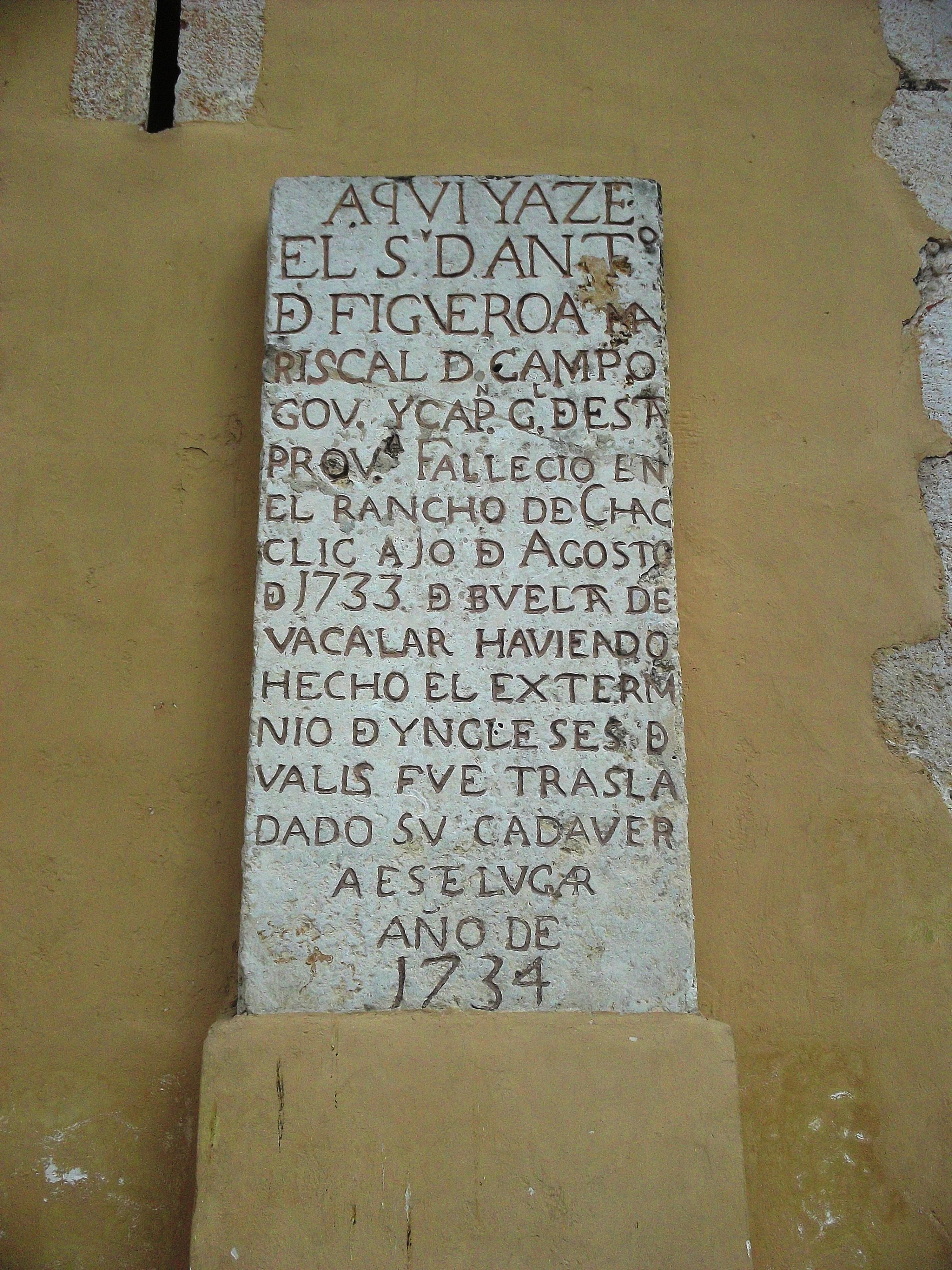 Placa conmemorativa de un episodio de la guerra entre Yucatán y la Honduras Británica.